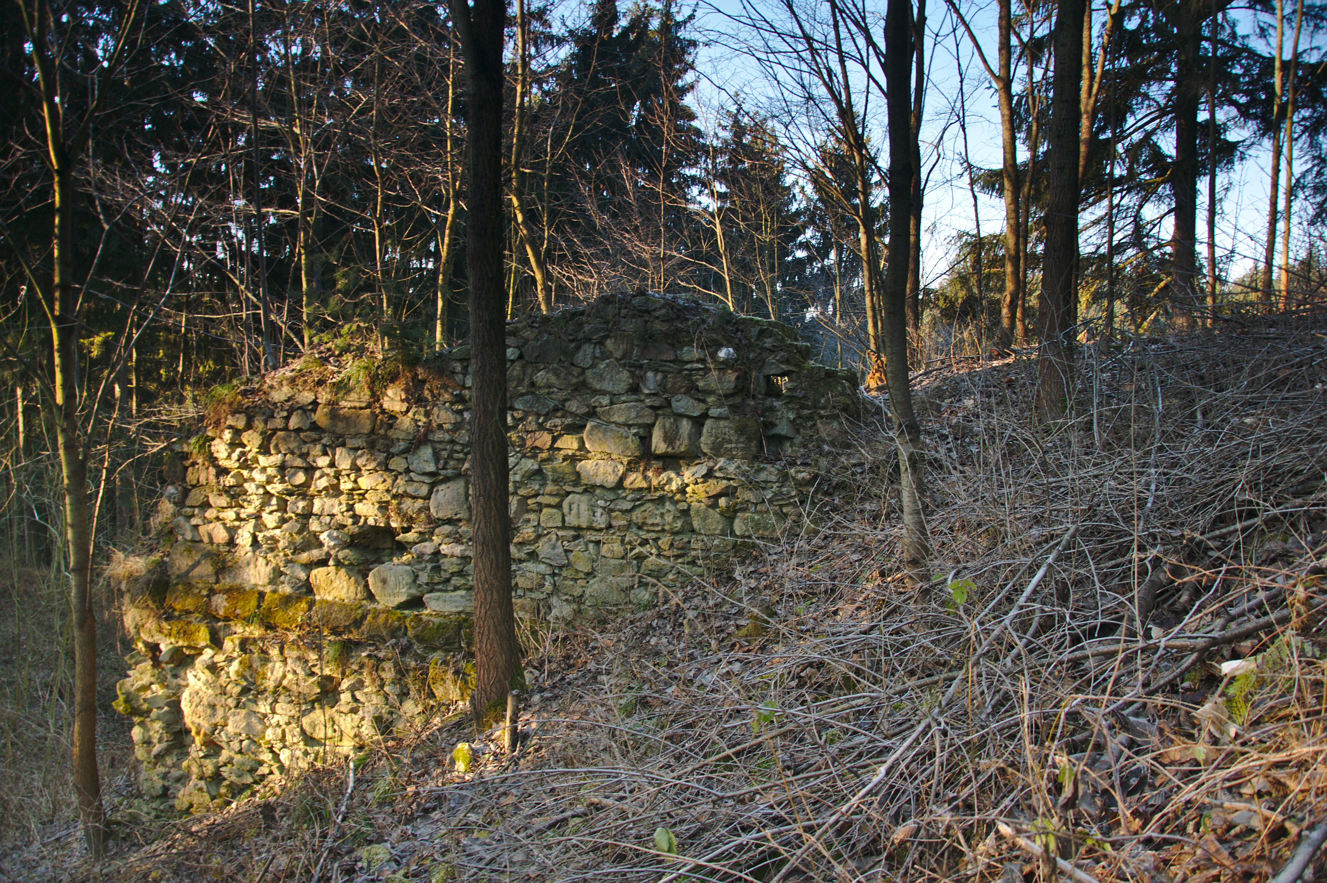 Zřícenina hradu Doubravice nad Svitavou, okres Blansko